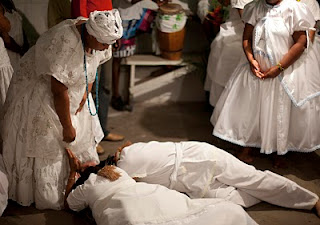 Foto retirada pelo fotografo Almir Bindilatte.